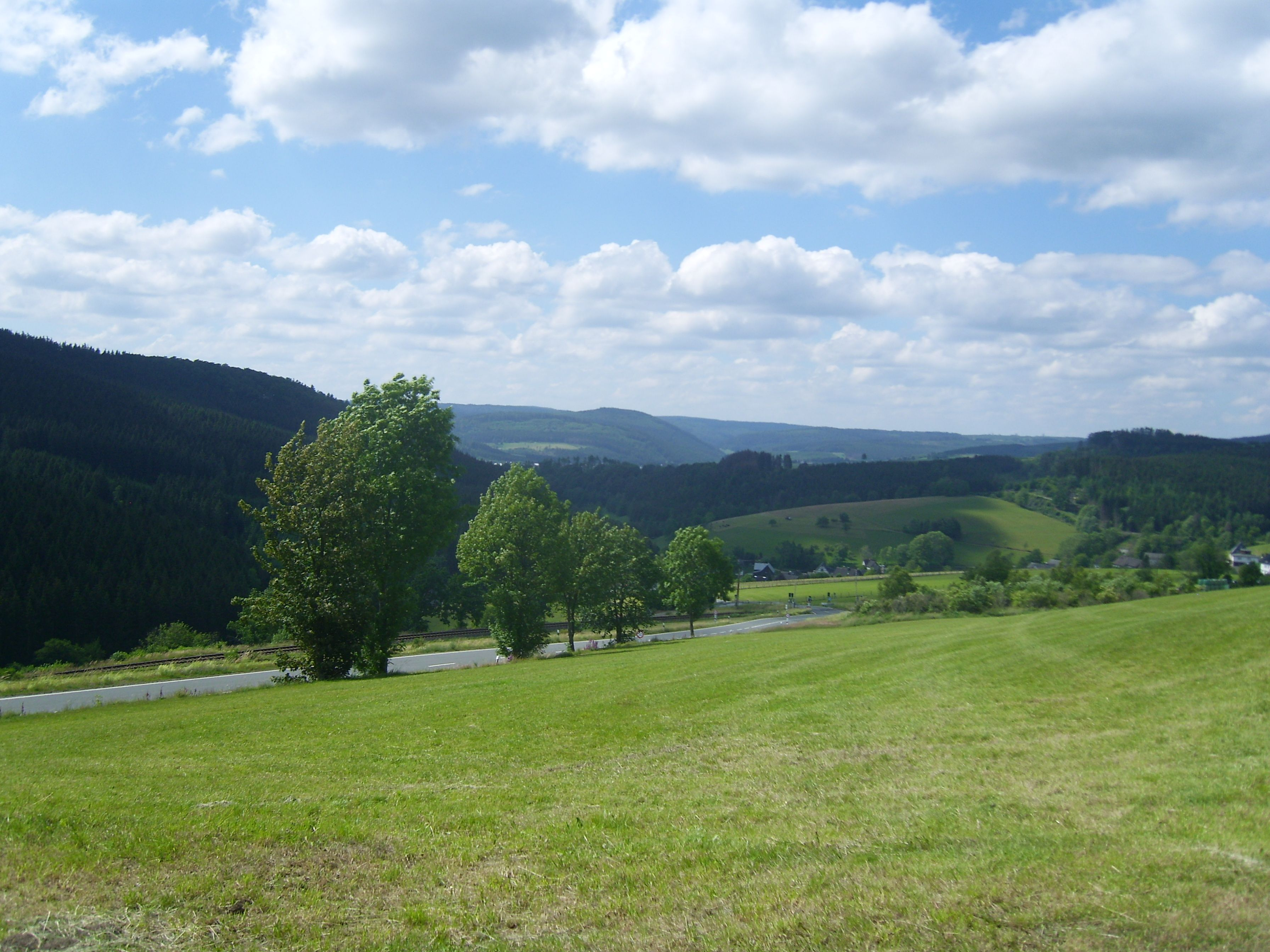 Blick auf Amtshausen von Norden; im Hintergrund Hohes Haupt (650,8 m; 1,4 km), Kompass (694,1 m; 10,7 km), Lahnhelle (642,5 m; 6,6 km), Jagdberg (676,3 m; 11,1 km), Jägerhain (unscheinbar; 651,8 m; 8,1 km), Eichenrötchen (575,3 m; 1,9 km, links und rechts davon sieht man die Flanken der Birkenhecke (661,2 m; 4,4 km) – siehe Udeuschle